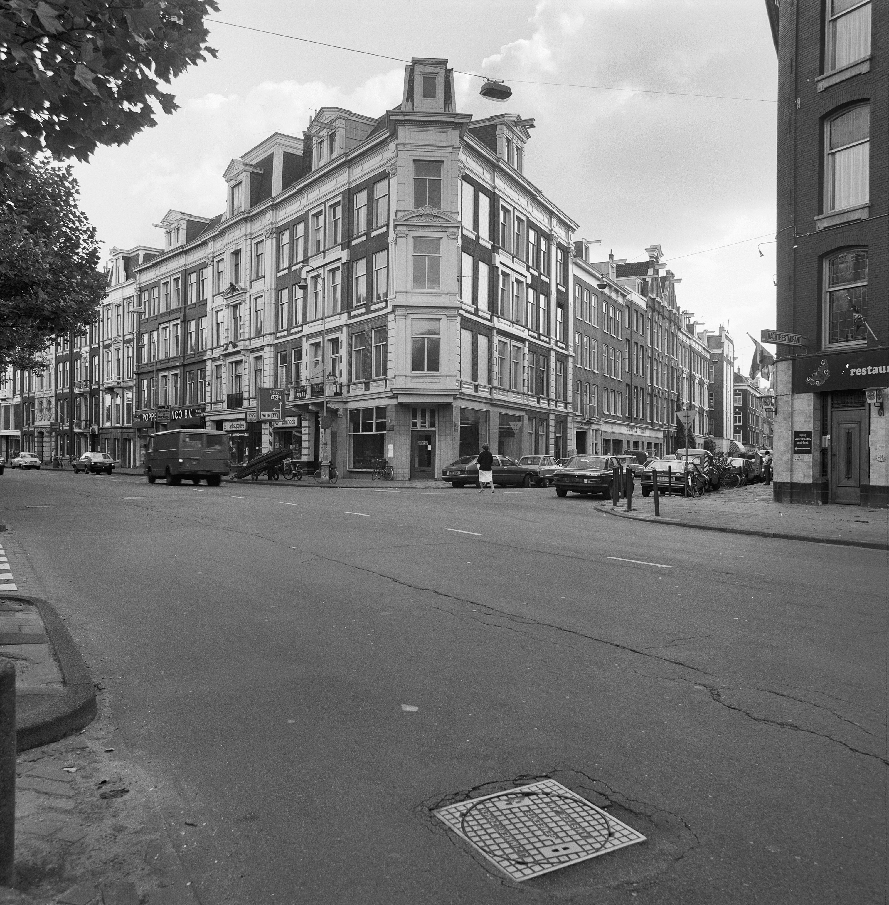 hoek Frans Halsstraat, overzicht; ontwerp IJme Gerardus Bijvoets